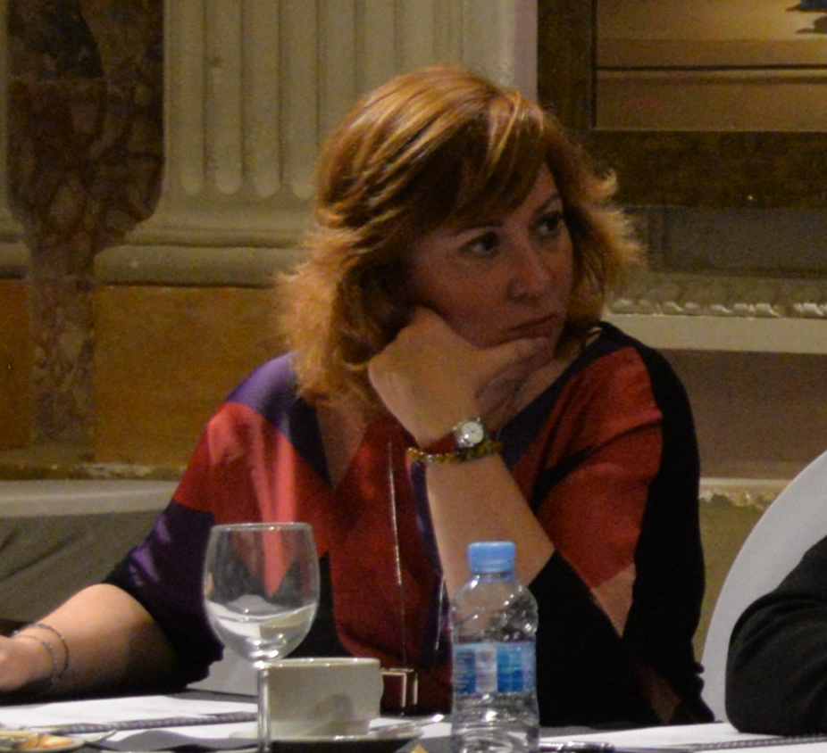 Lourdes Jiménez, febrero 2020